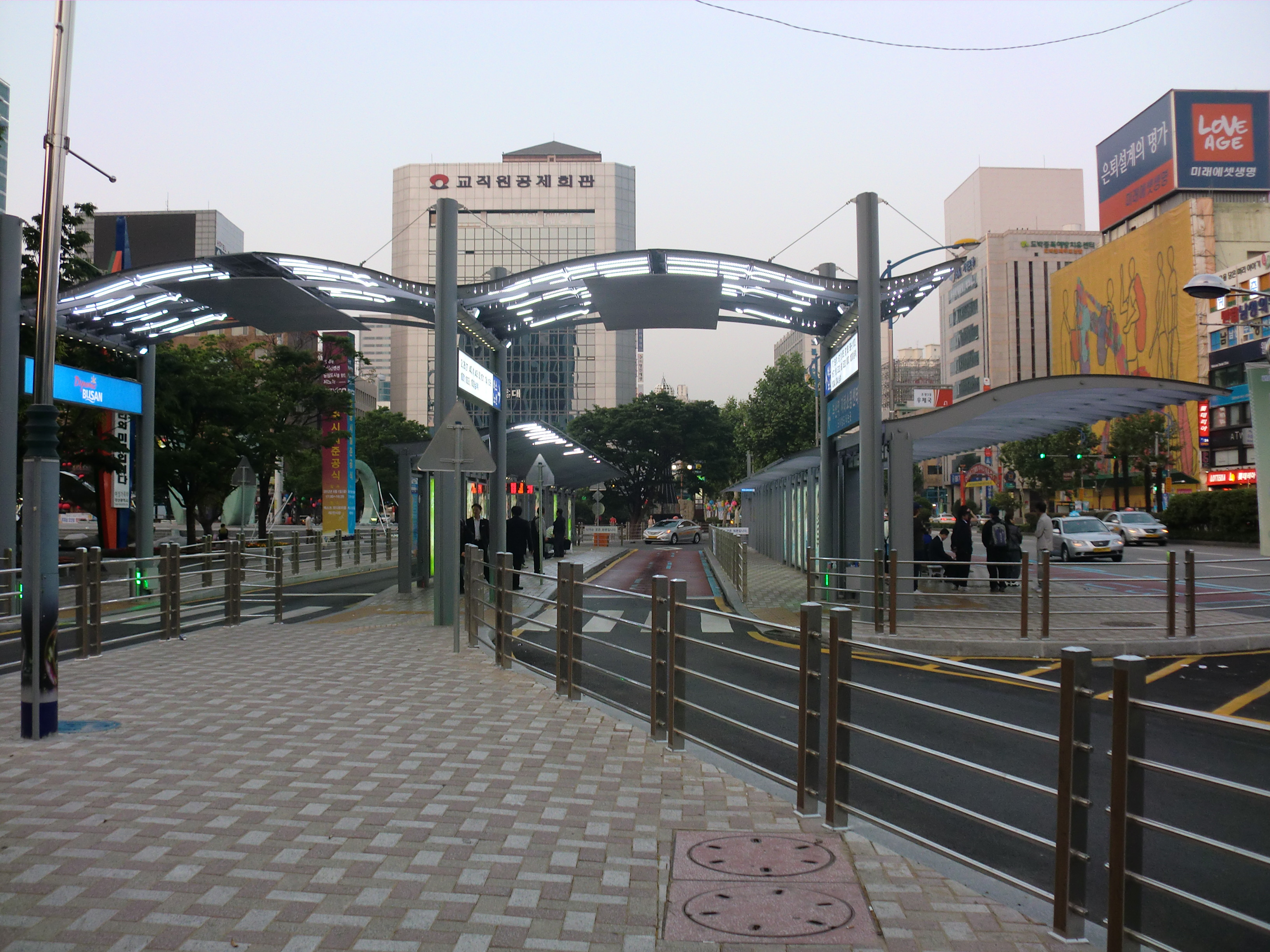 부산역전에 있는 버스정류장